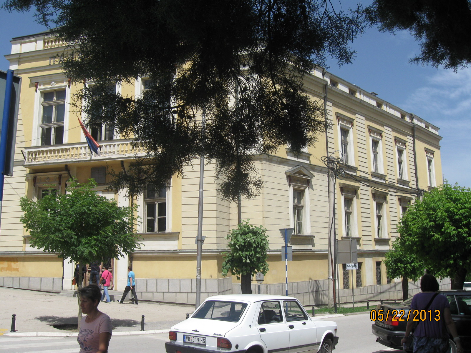 Зграда Општинског суда у Врању